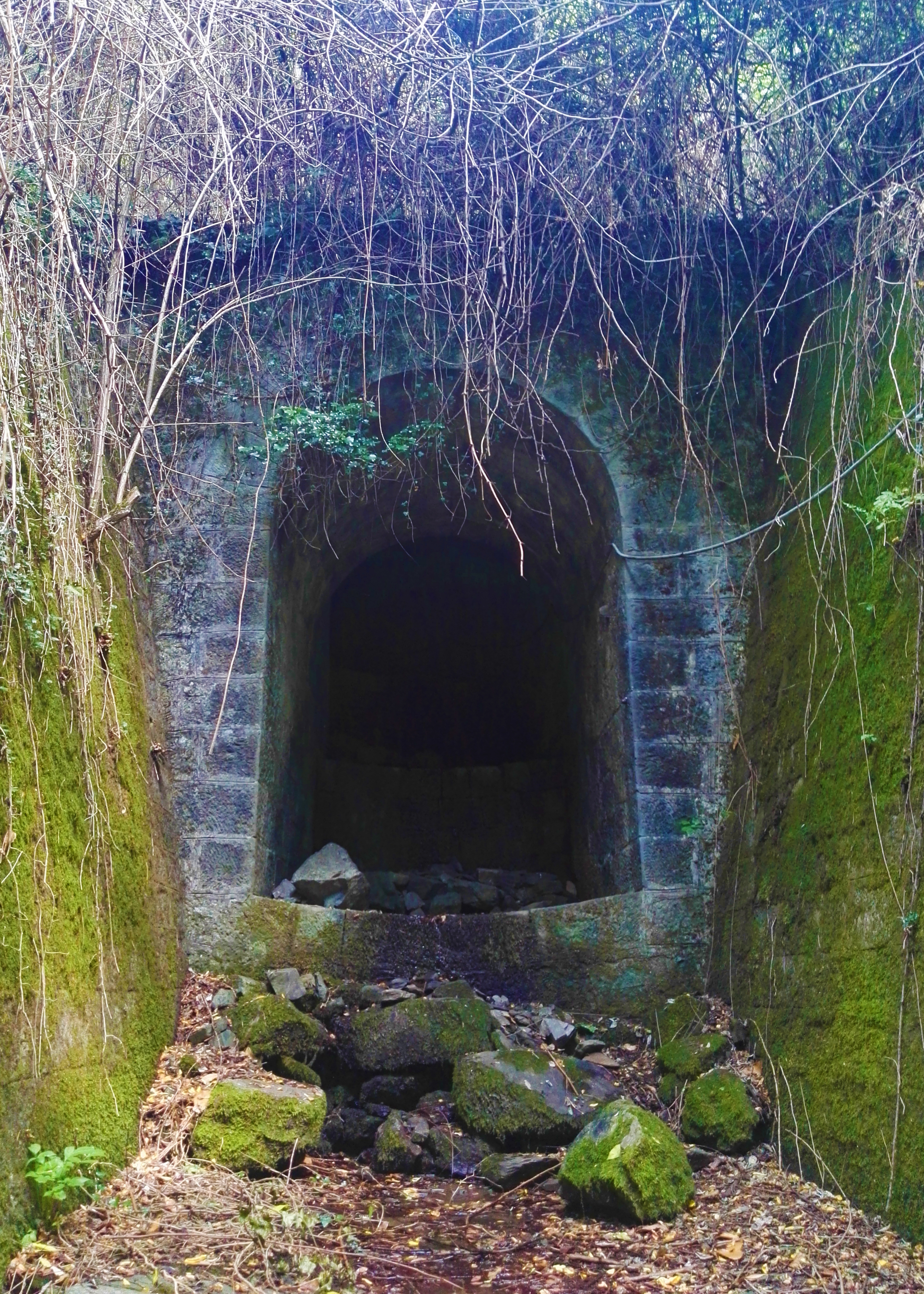 La galleria idraulica nei pressi di Castagno